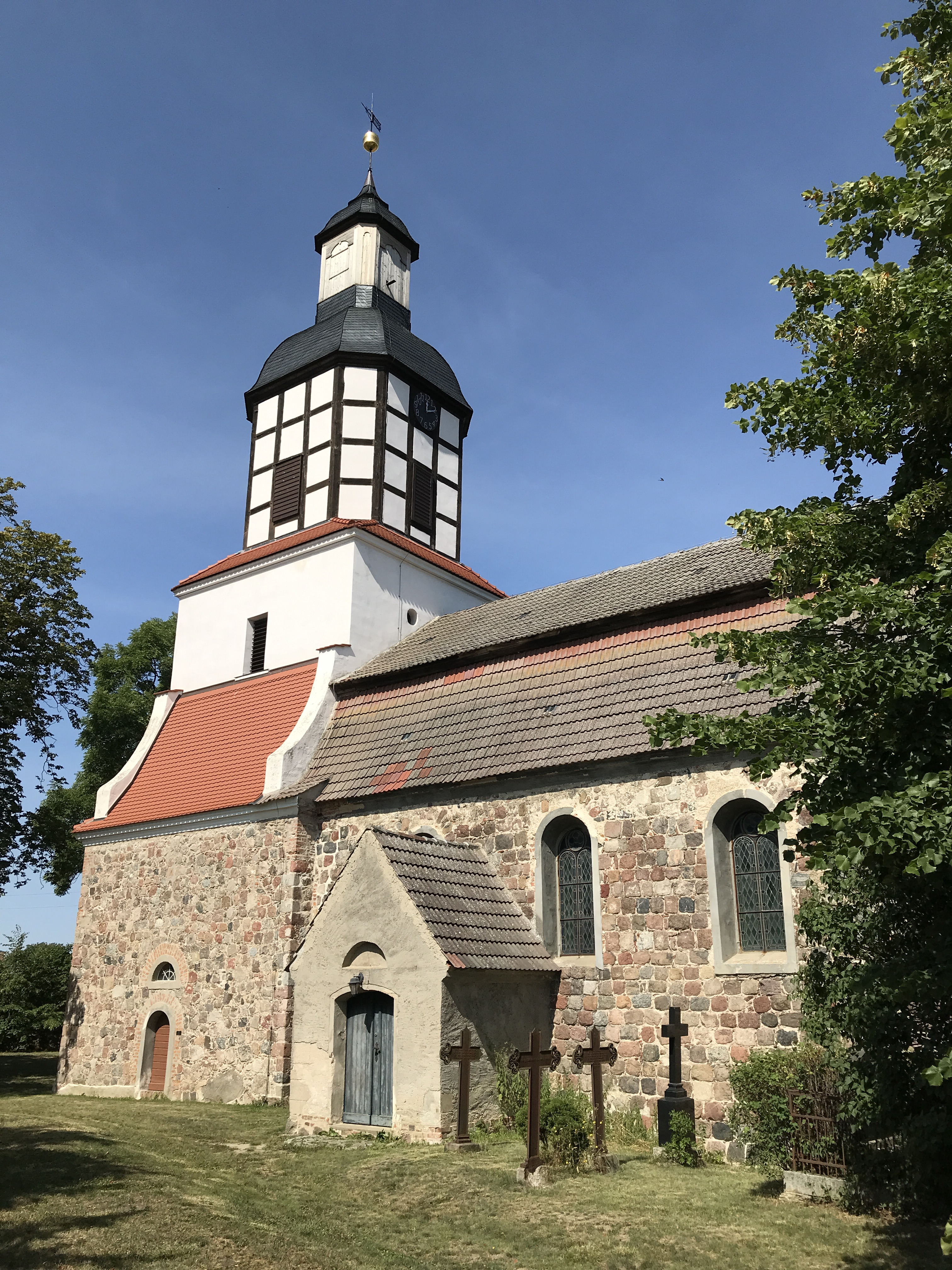 Die Dorfkirche Wismar im gleichnamigen Ortsteil der Gemeinde Uckerland im Landkreis Uckermark ist eine Feldsteinkirche aus dem 13. Jahrhundert. Im Innenraum steht unter anderem ein Kanzelalter aus dem 18. Jahrhundert.